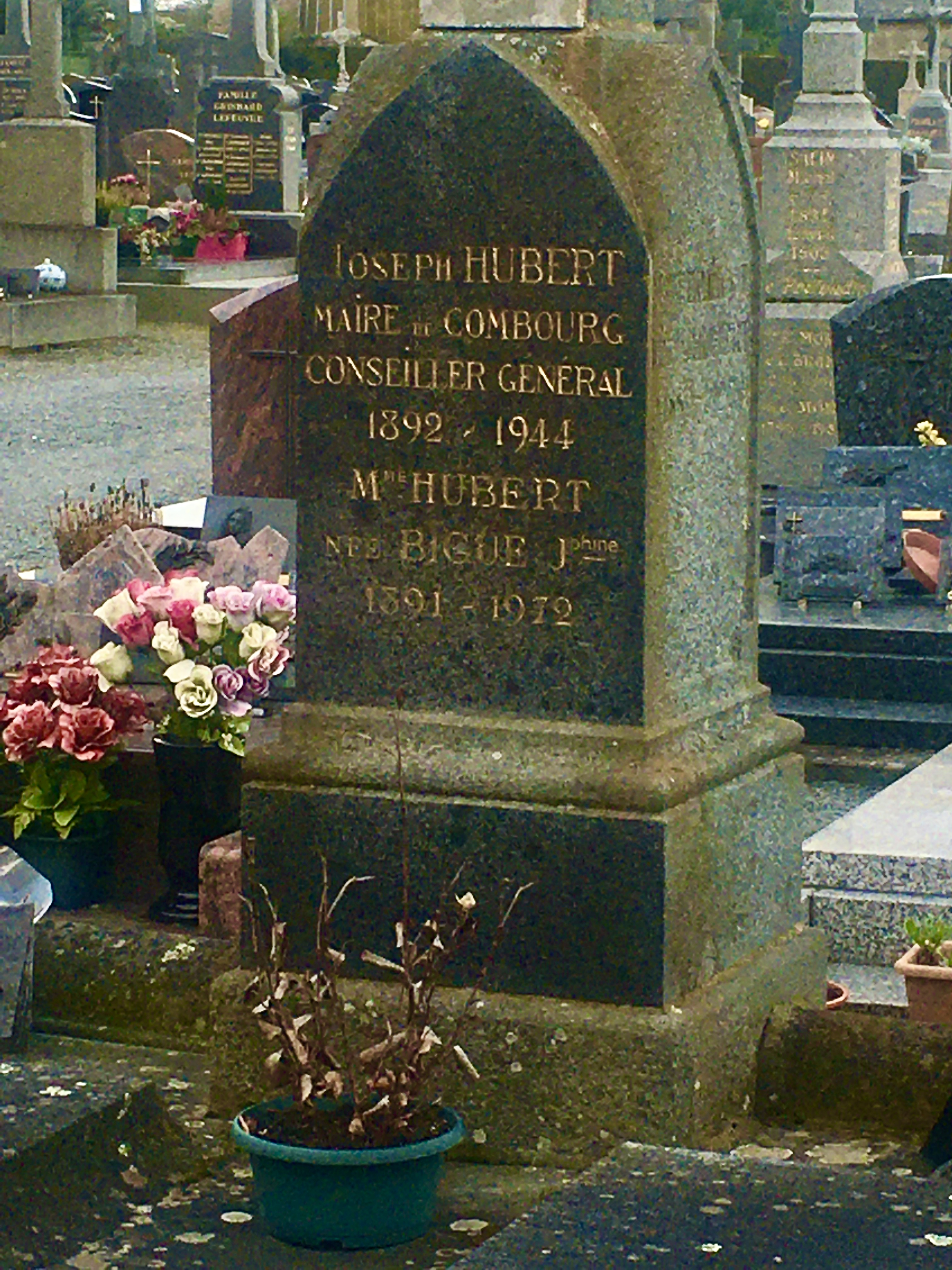 Pierre tombale de Joseph Hubert père et de son épouse au cimetière du Centre à Combourg.